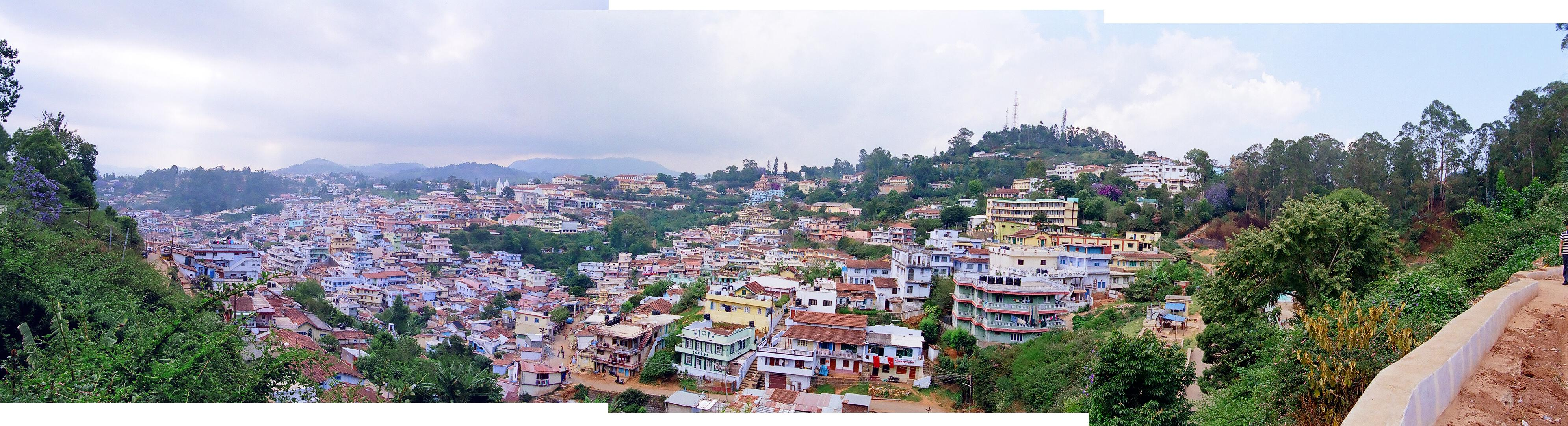 A view of Coonoor.